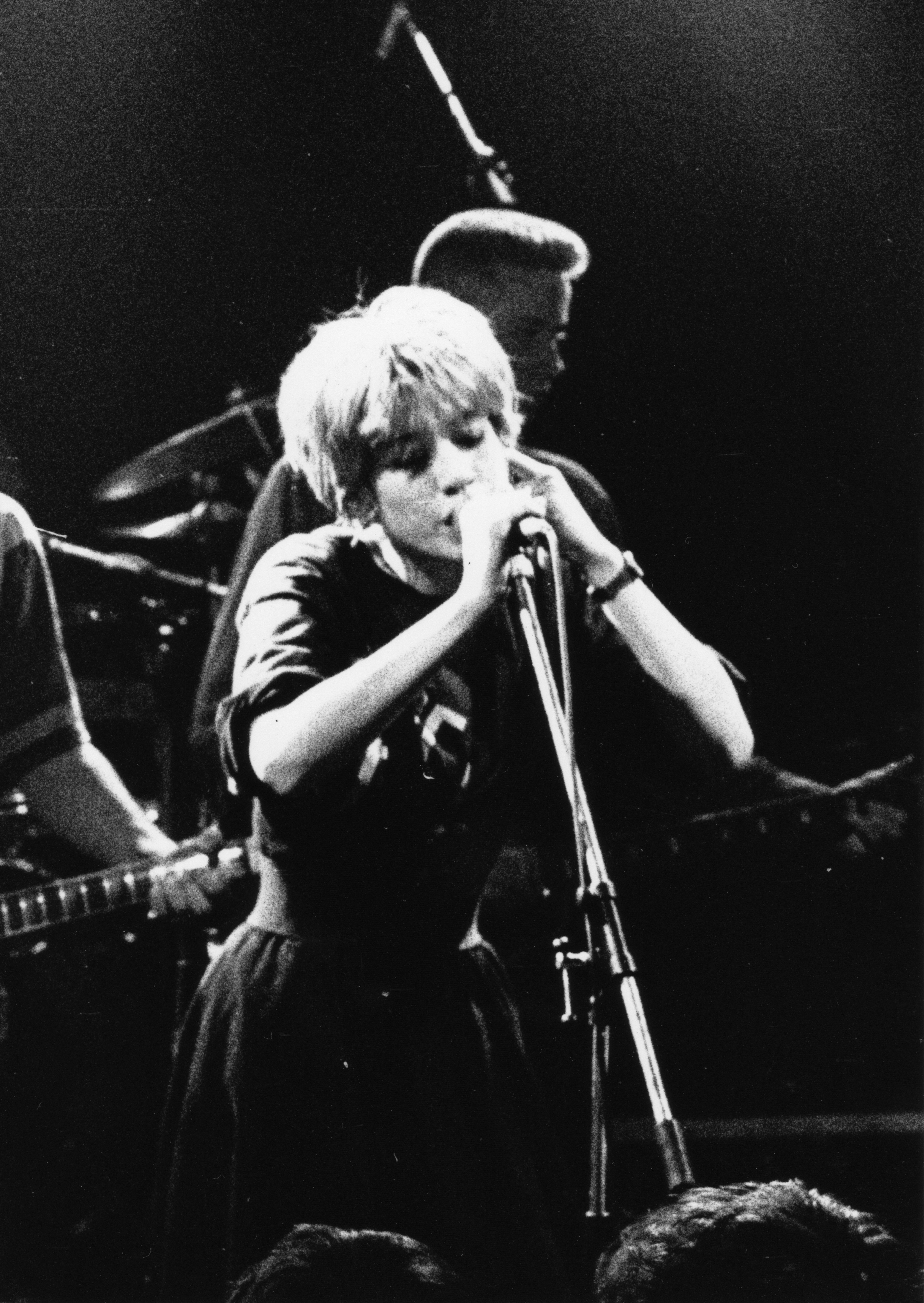 Miki Berenyi, Rennes, avril 1990